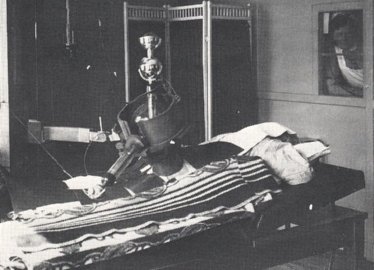 Röntgenbehandling på Radiumhemmet 1917